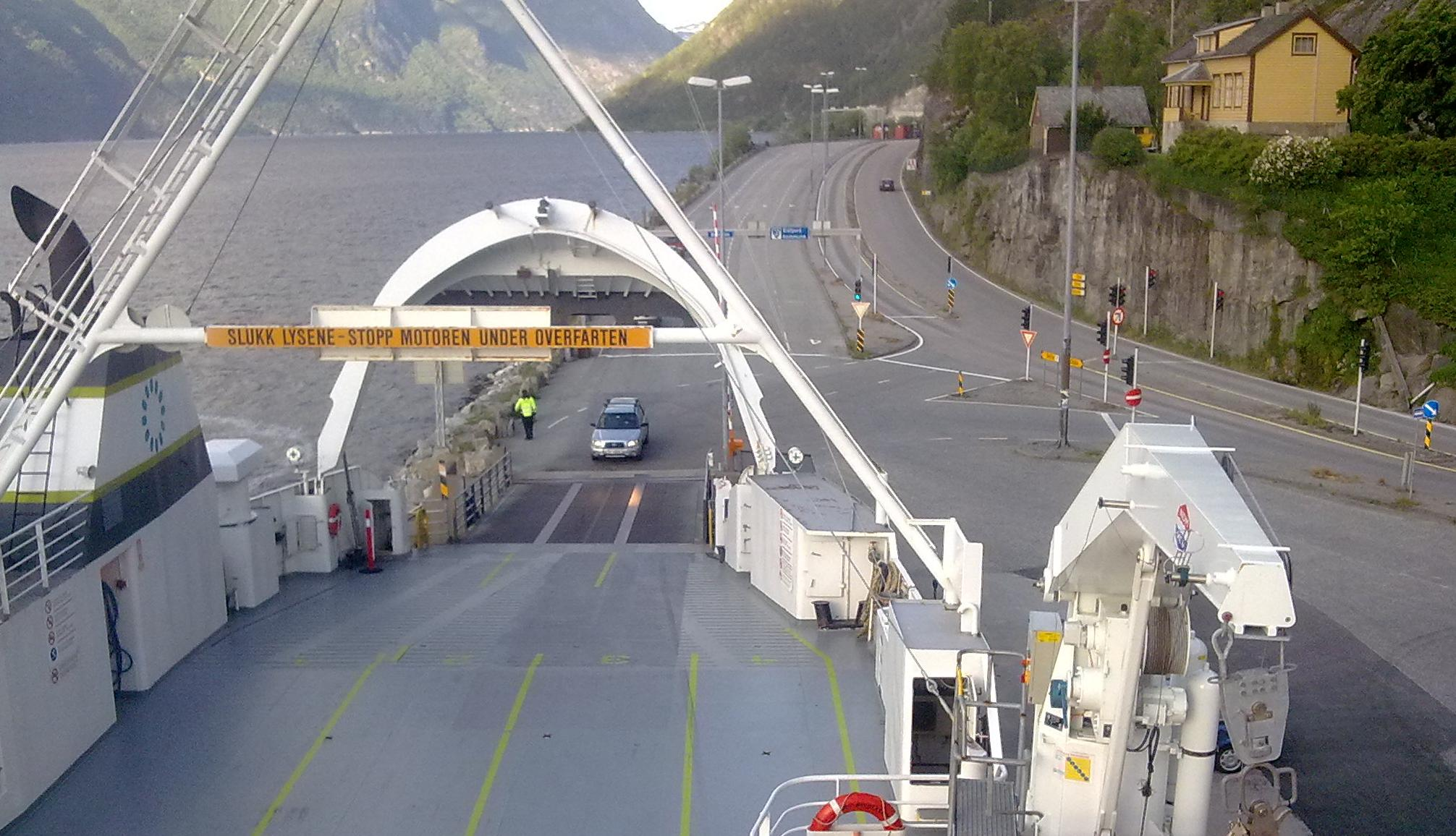 Brimnes ferjekai sett fra M/F Melderskin